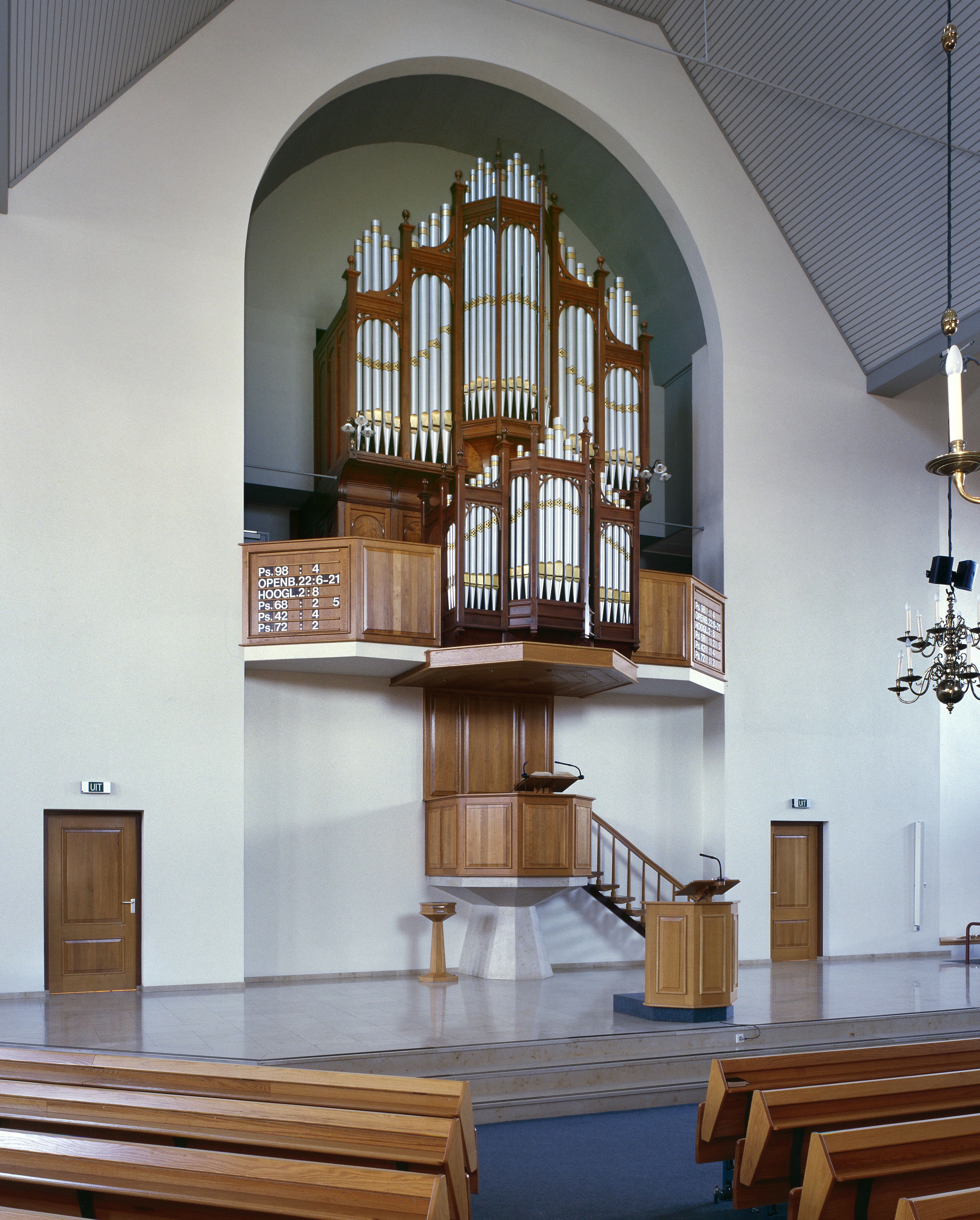 Nederlands Hervormde Kerk: Interieur, aanzicht orgel, orgelnummer 1395 (opmerking: Gefotografeerd voor Het Historische Orgel in Nederland 1886-1894, bladzijde 238)